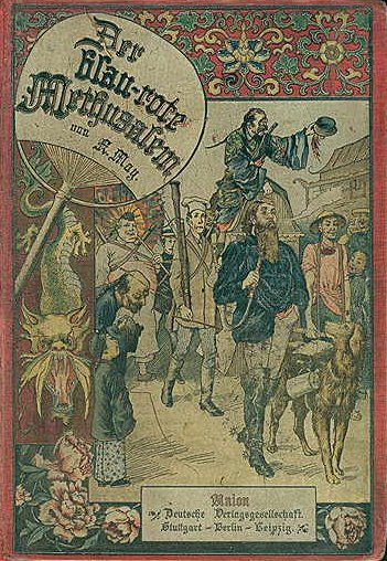 Deckelbild der 1904 erschienenen vierten Buchauflage von Karl Mays Der blaurote Methusalem. Mit einem farbigen Titelbild und 16 Tondruckbildern. Illustrationen von Oskar Herrfurth.